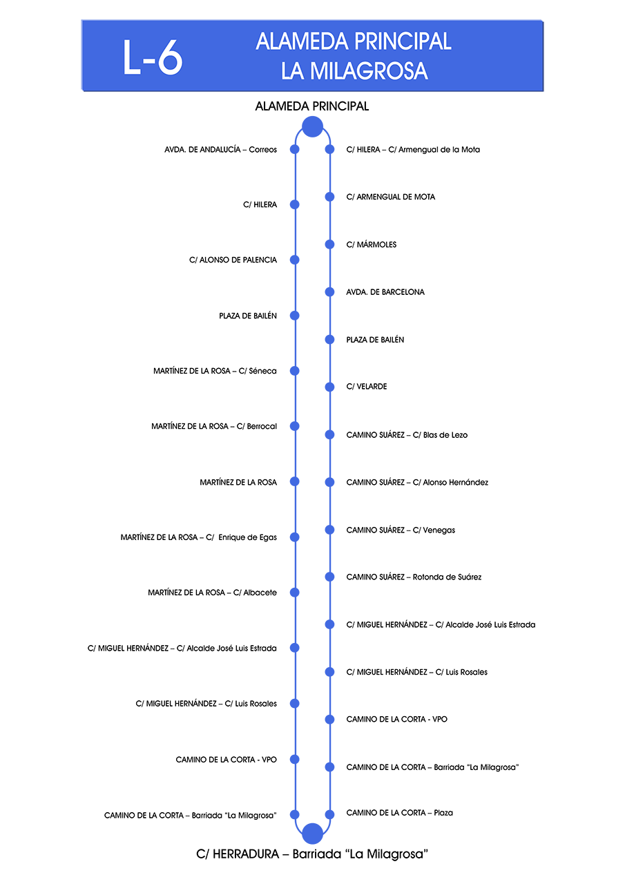 Recorrido de la línea 6 de la EMT de Málaga.